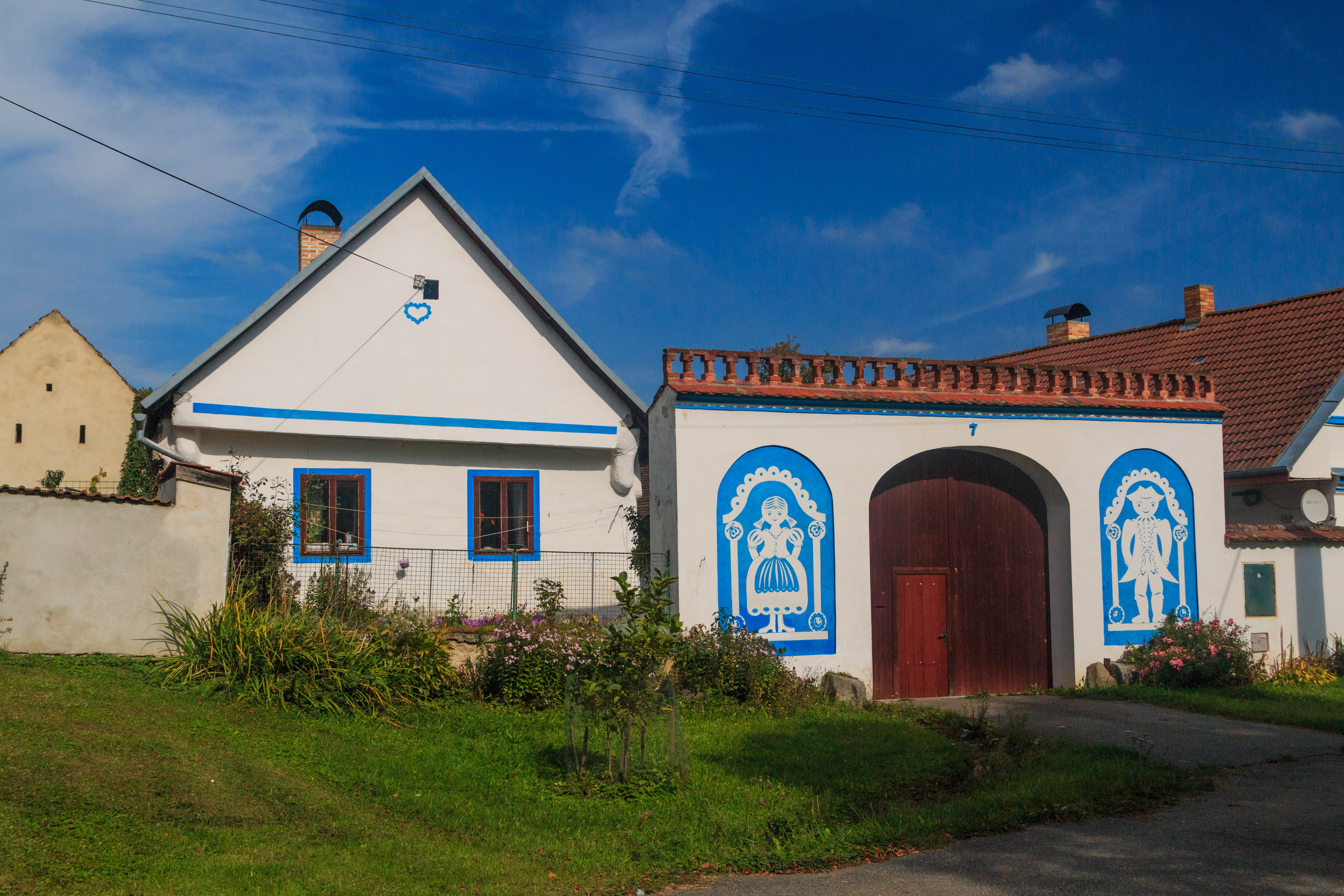 Černíkov u Droužetic - čp. 7